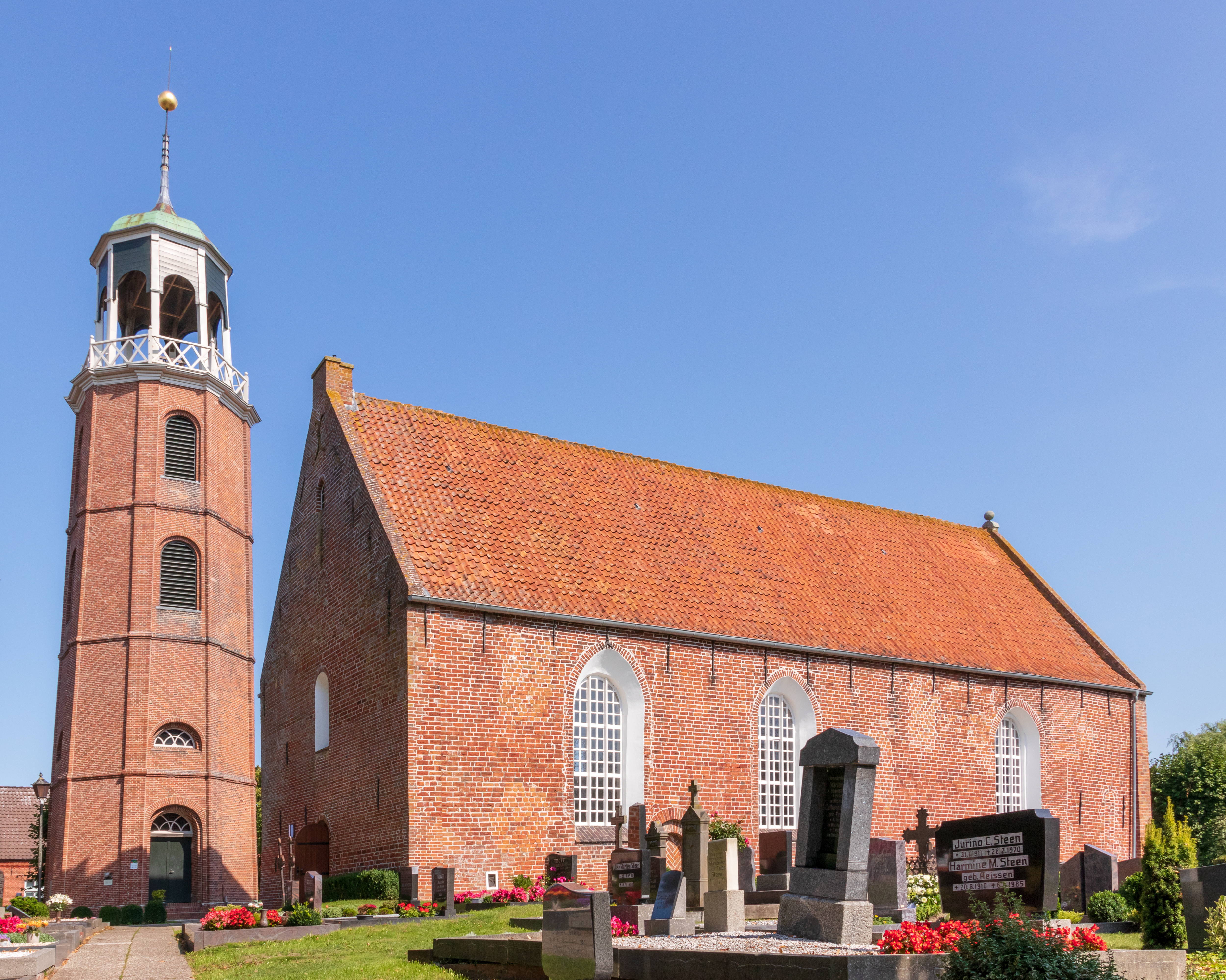 Ev. Rev. Kirche Ditzum. mit: Kirchhof, Grabsteine; Einschiffiger, romanischer Backsteinbau mit hochsitzenden Fenstern auf der Nordseite. Drei kräftig abgetreppte Rundbogenportale später vermauert. Erbaut frühes 13. Jahrhundert. Bedeutung: historisch, künstlerisch, wissenschaftlich, städtebaulich; wesentliche Begründung: 1.05 geschichtliche Bedeutung aufgrund des Zeugnis- und Schauwertes für Bau- und Kunstgeschichte; Einzeldenkmal gemäß § 3.2 NDSchG; in Gruppe baulicher Anlagen: 457012Gr0016